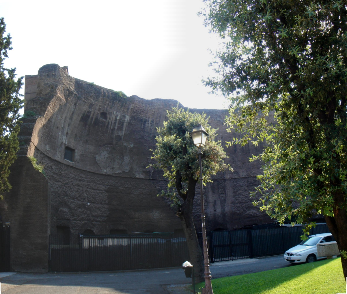 Roma, Terme di Diocleziano: esedra su via Volturno